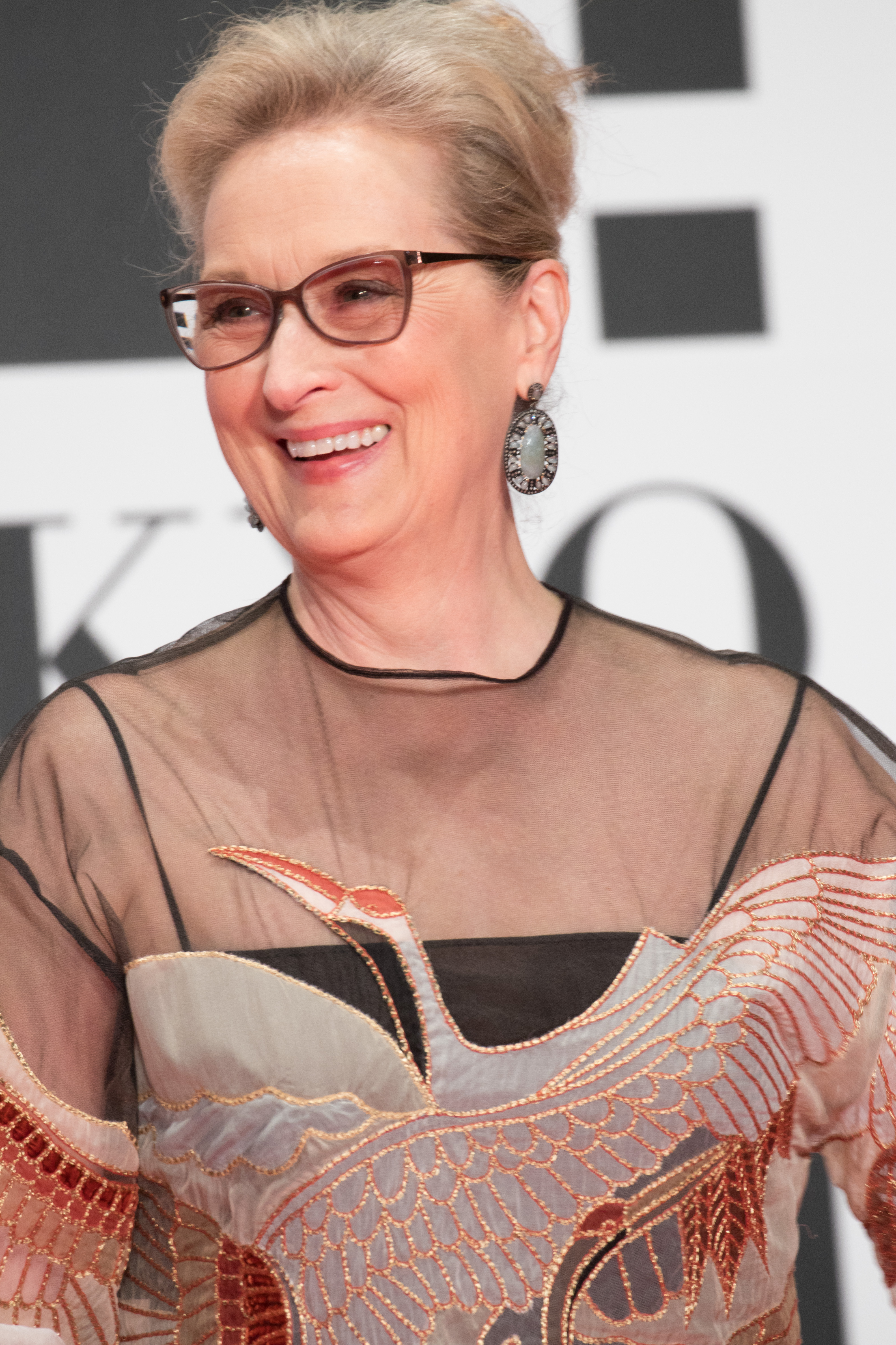 第29回 東京国際映画祭 オープニングセレモニー メリル・ストリープ (マダム・フローレンス! 夢見るふたり)